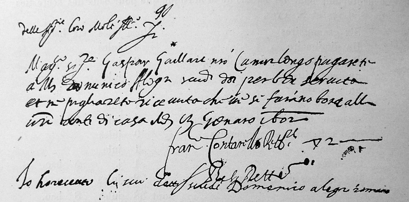 facsimile del pagamento effettuato a Domenico Allegri per l'uscita dal servizio della cappella di S. Luigi dei Francesi il 13 gennaio 1602